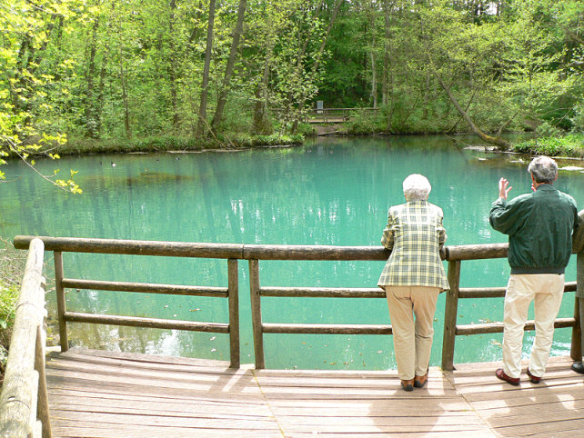 Rhumequelle